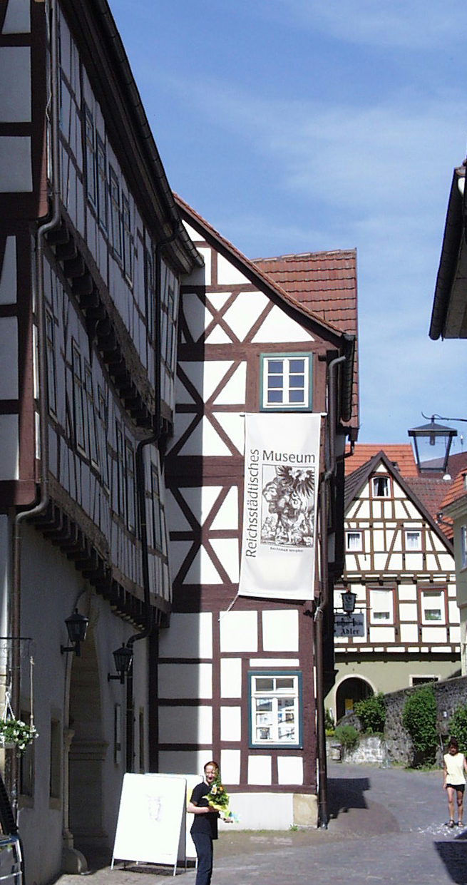 Eindrücke aus Bad Wimpfen